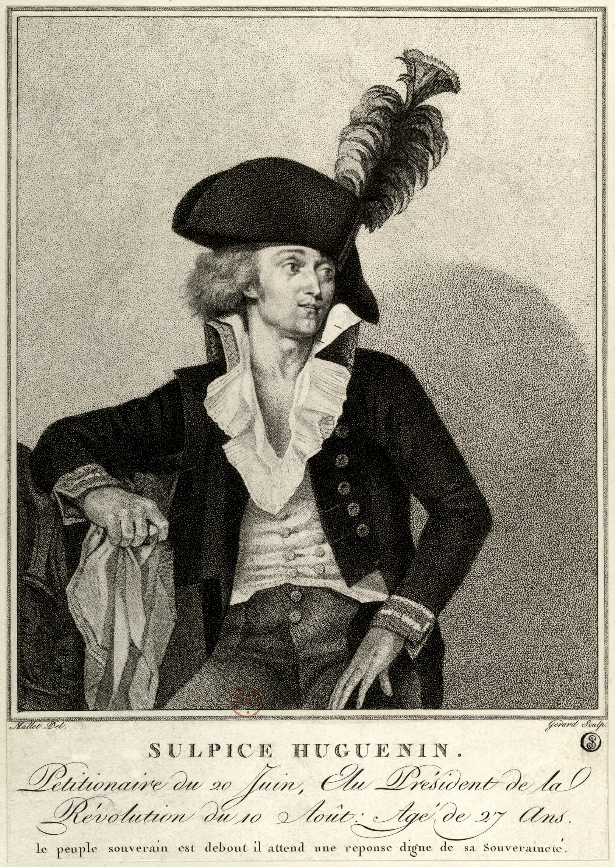 Sulpice Huguenin (1750-1803), révolutionnaire français.